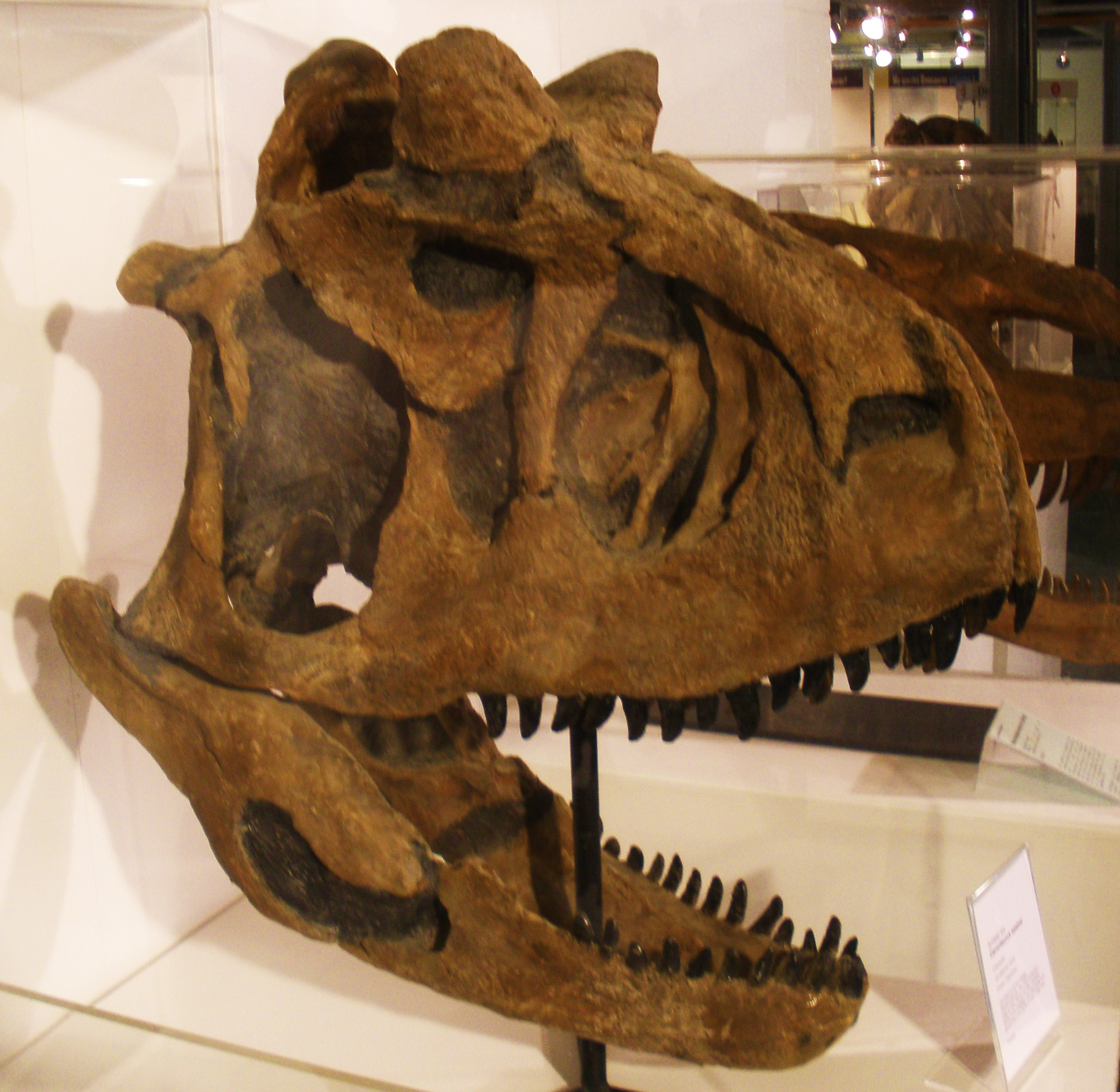 fossil Carnotaurus